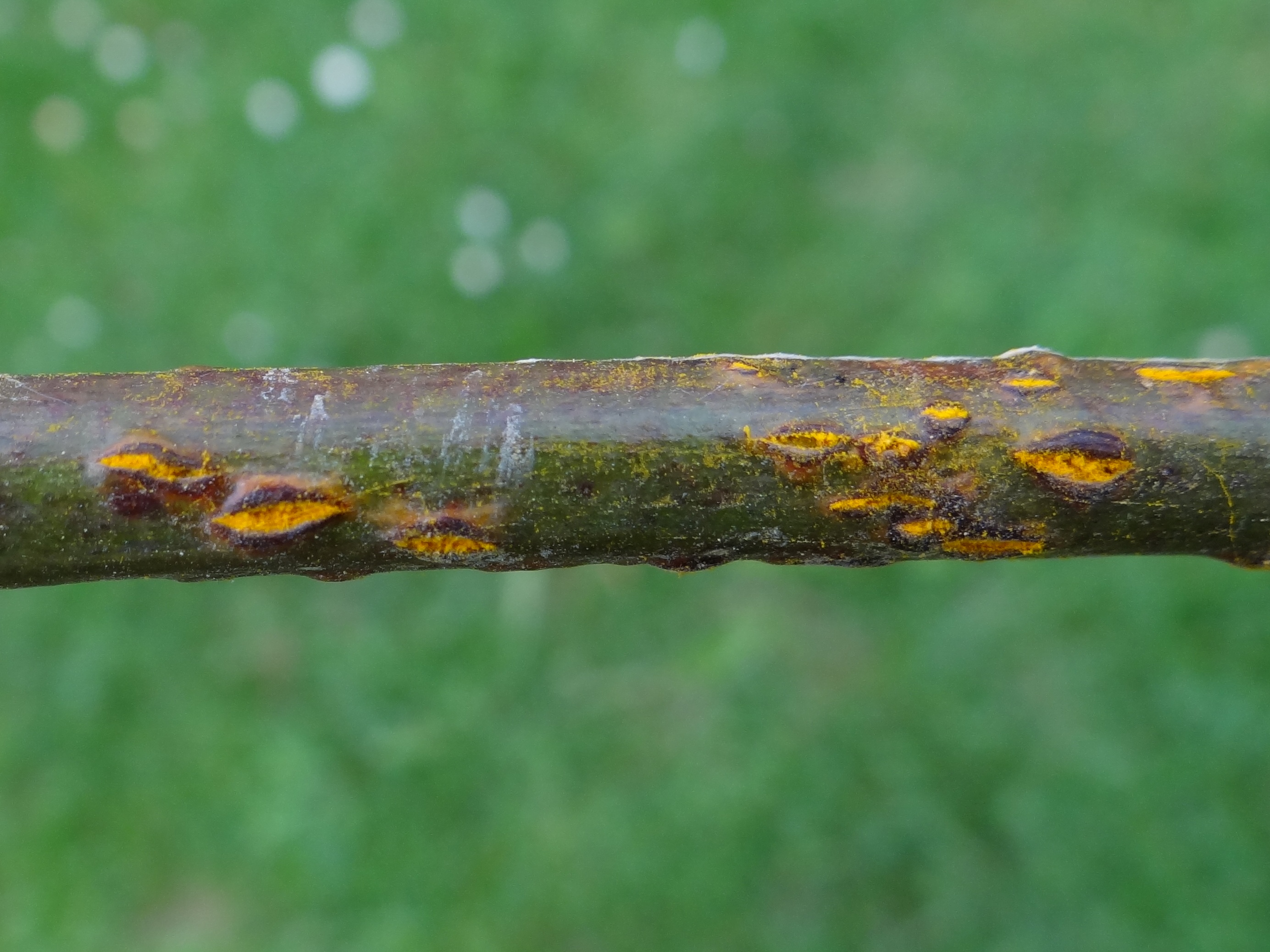 Phragmidium violaceum on Rubus (cultivar)